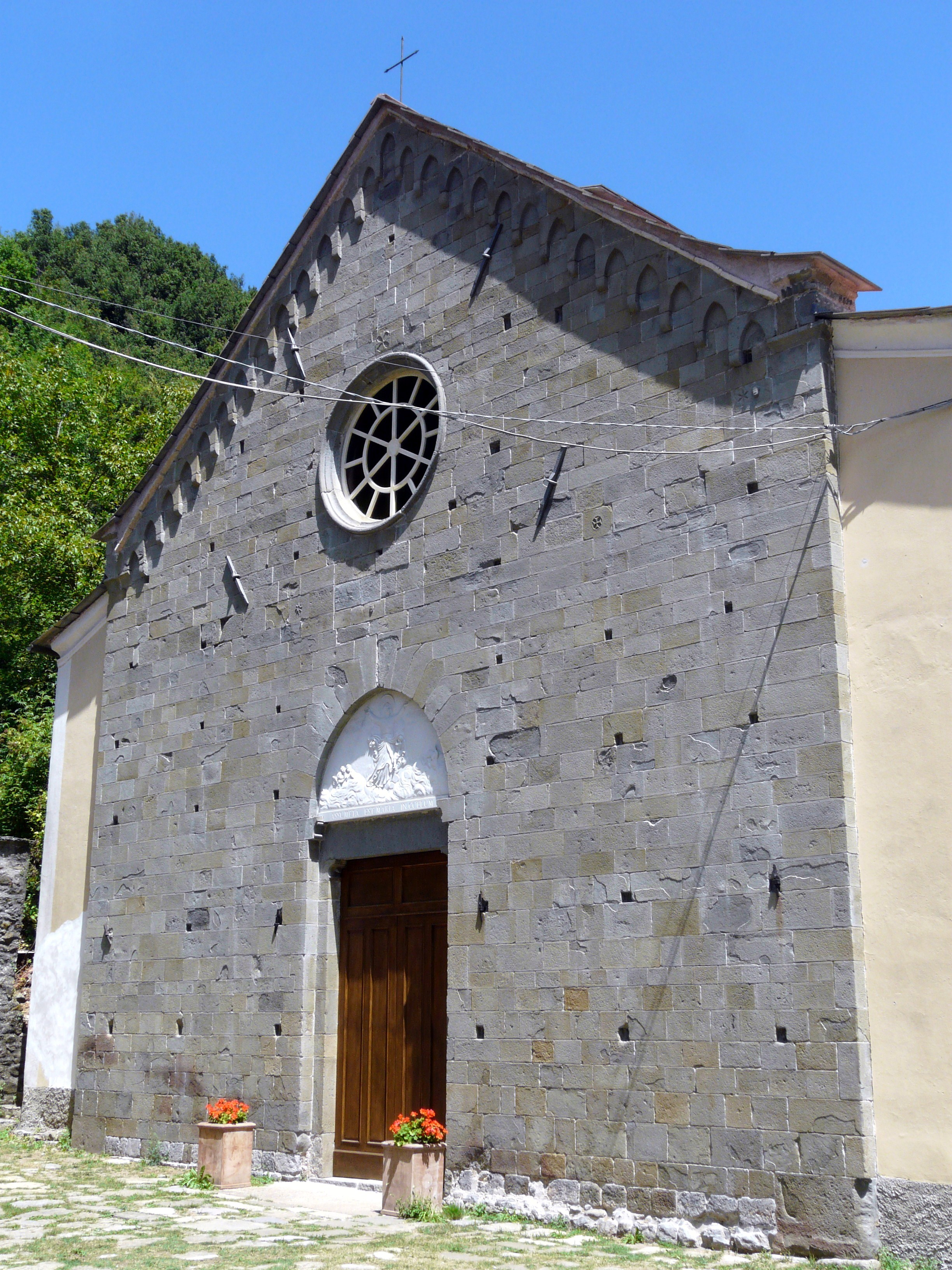 La pieve di Santa Maria Assunta, Pignone, Liguria, Italia